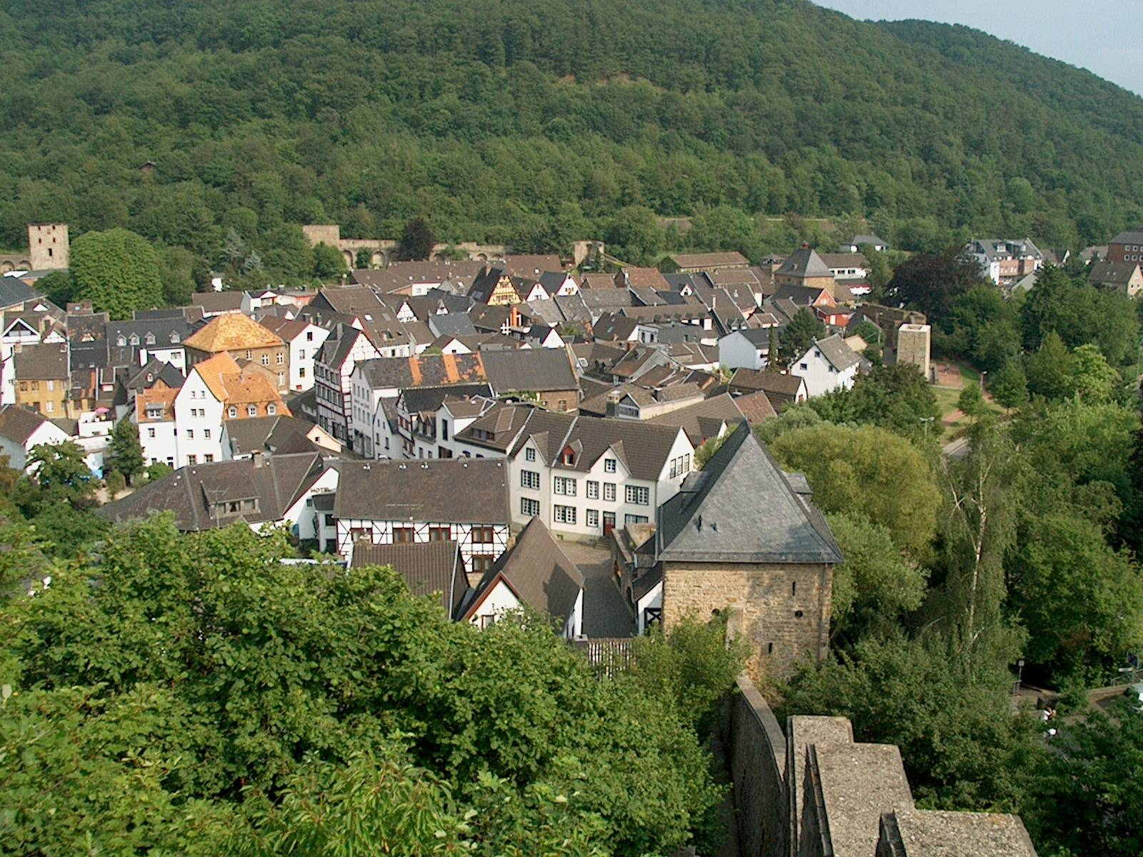 Bad Münstereifel - Stadtansicht Richtung Westen